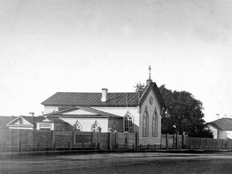 Начало 1900-х годов. Петрозаводск. Улица Гоголевская. Немецкая лютеранская церковь